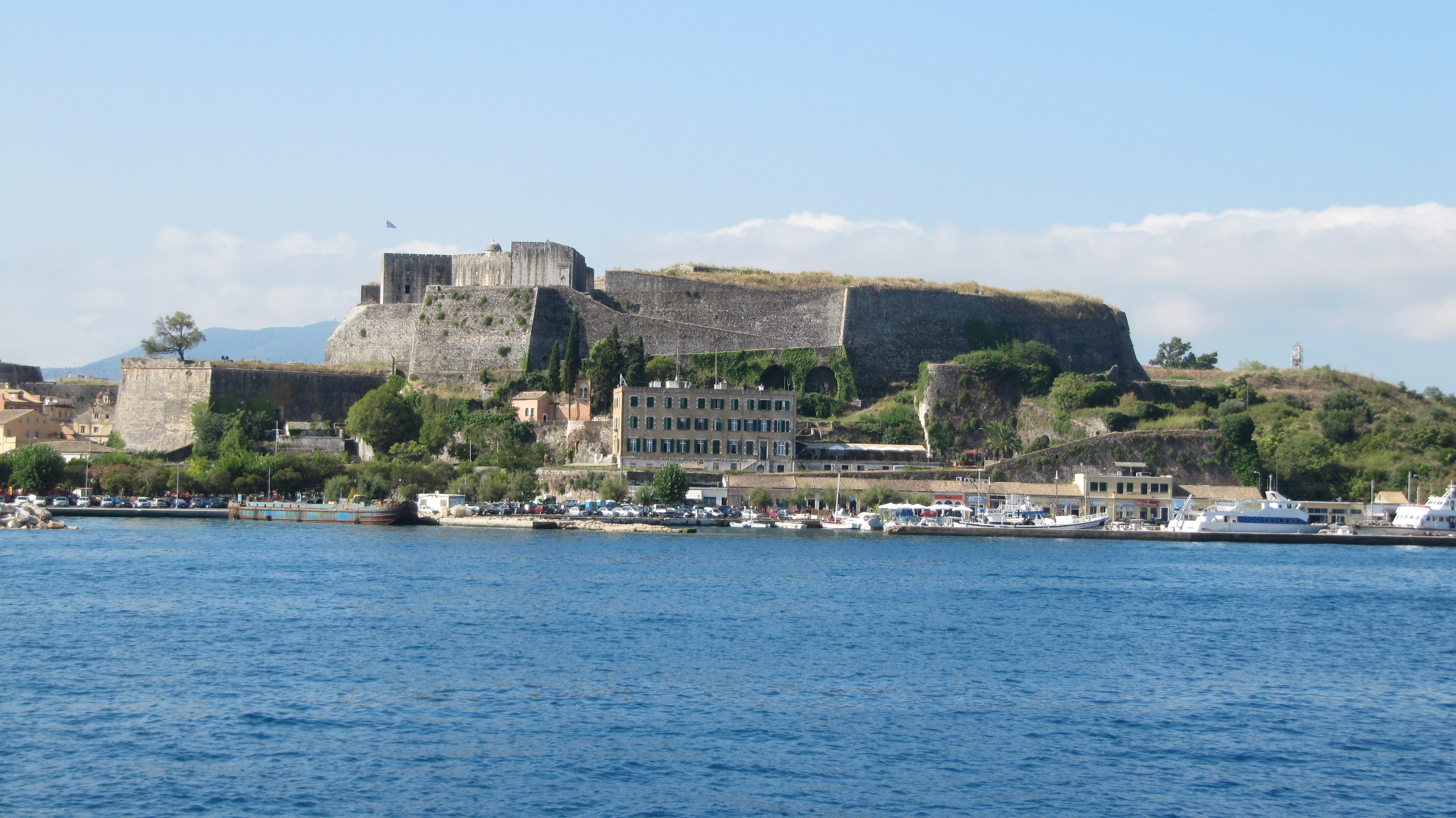 Vue sur la citadelle de Corfou (depuis la mer)